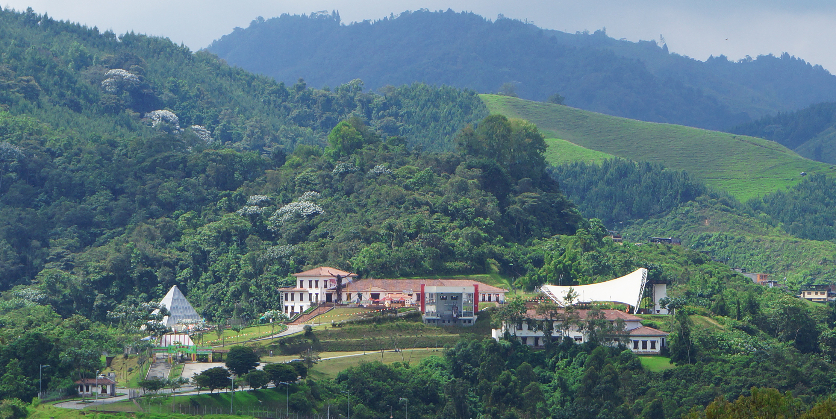 Vista del Ecoparque Los Yarumos